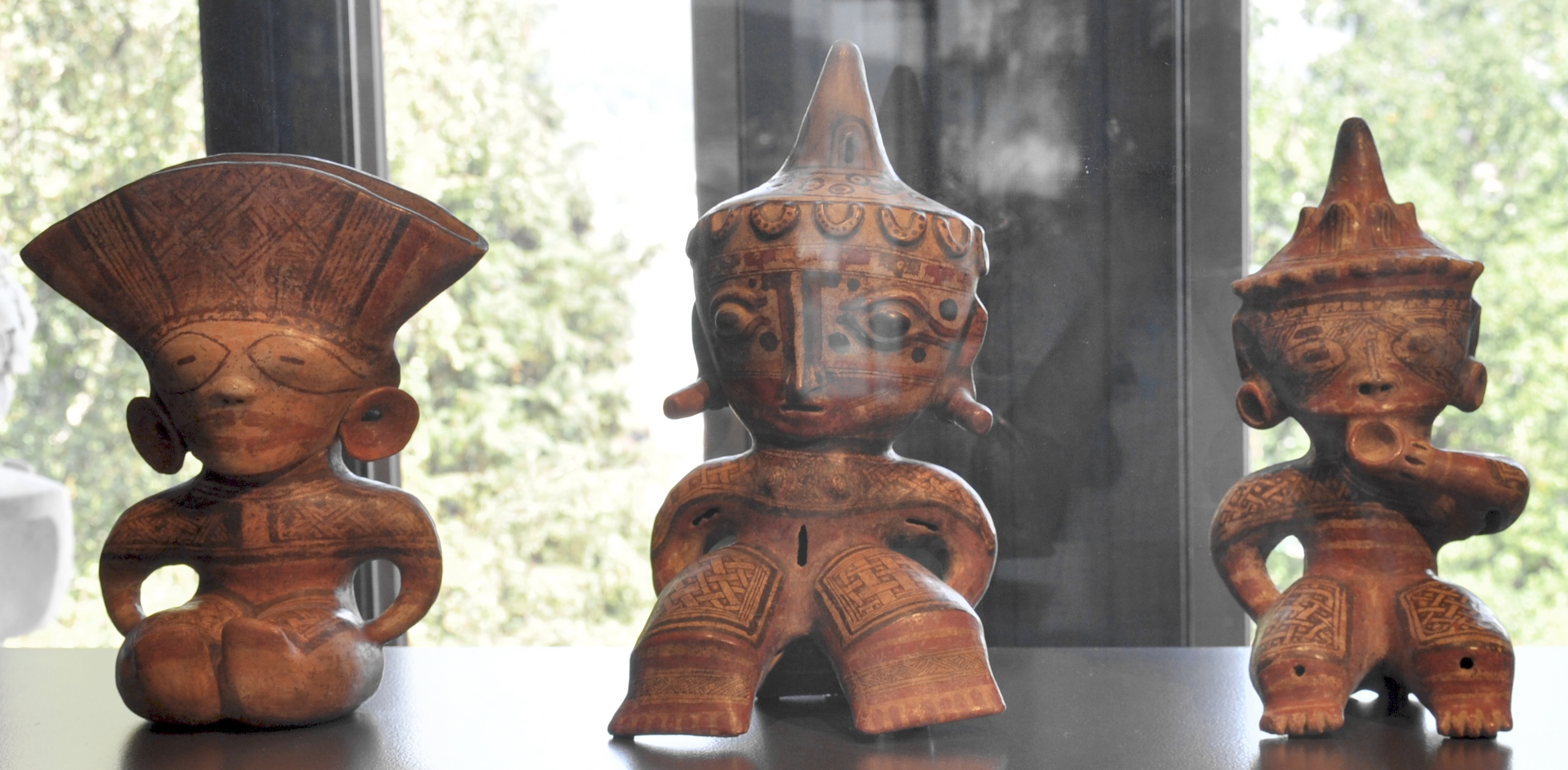 Sitzende Figuren, Nicoya-Region, Costa Rica, um 800-1200 n. Chr.; gebrannter Ton Museum Rietberg, Zürich; Geschenk Lisa und Ivan Vajda, Inv. Nr. RMA 511, RMA 512, RMA 2006.176